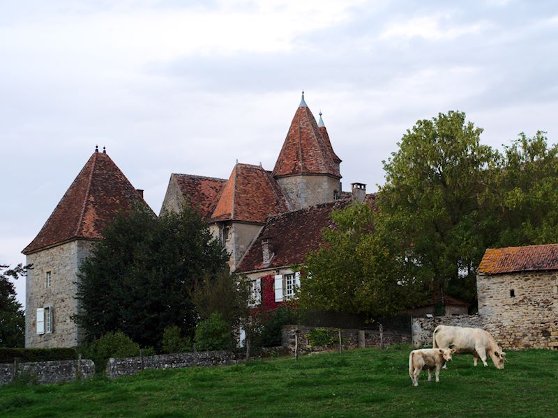 Château du Sauvement (Inscrit) .